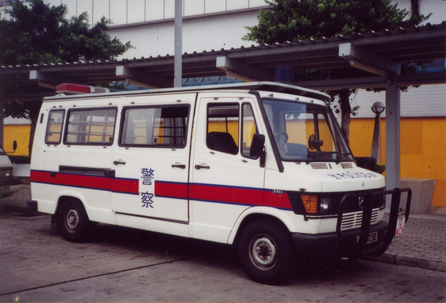 Hong Kong Police Van (Mercedes-Benz TN)